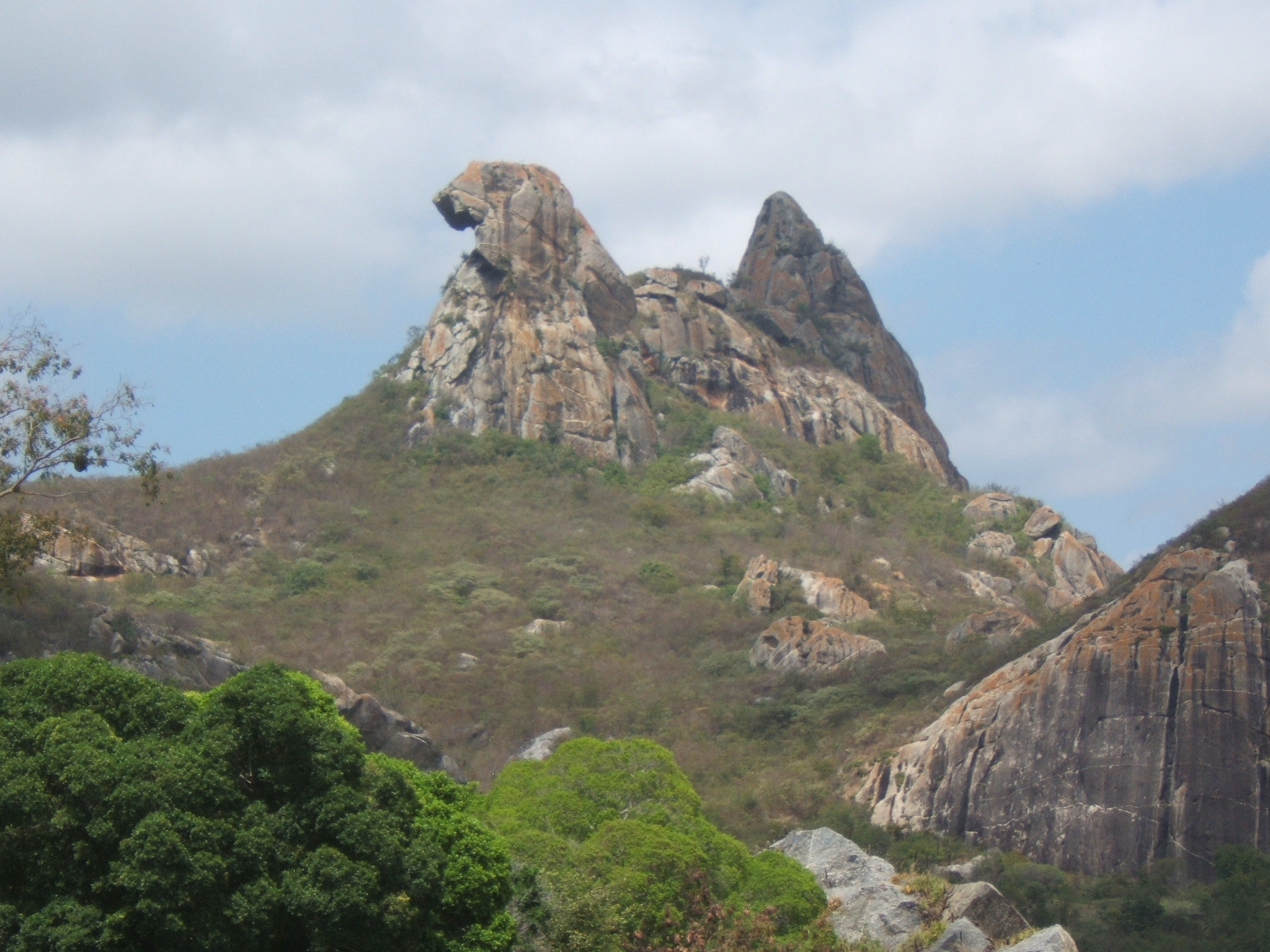 A famosa pedra da galinha choca.